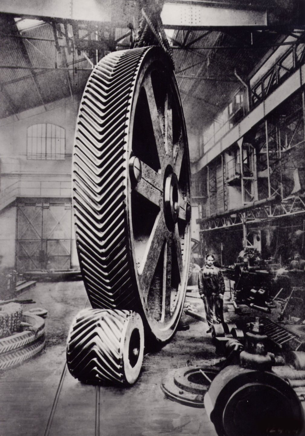 Engrenage Citroën